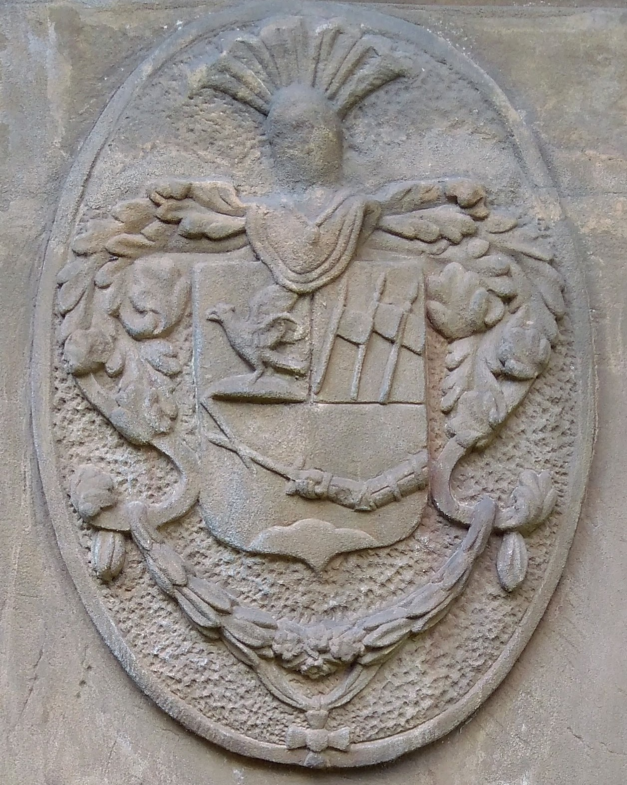 Pomník na památku generála rytíře Václava Jana Frierenbergu, na hřbitově, Velehradská, pp. 807/1, Kroměříž.